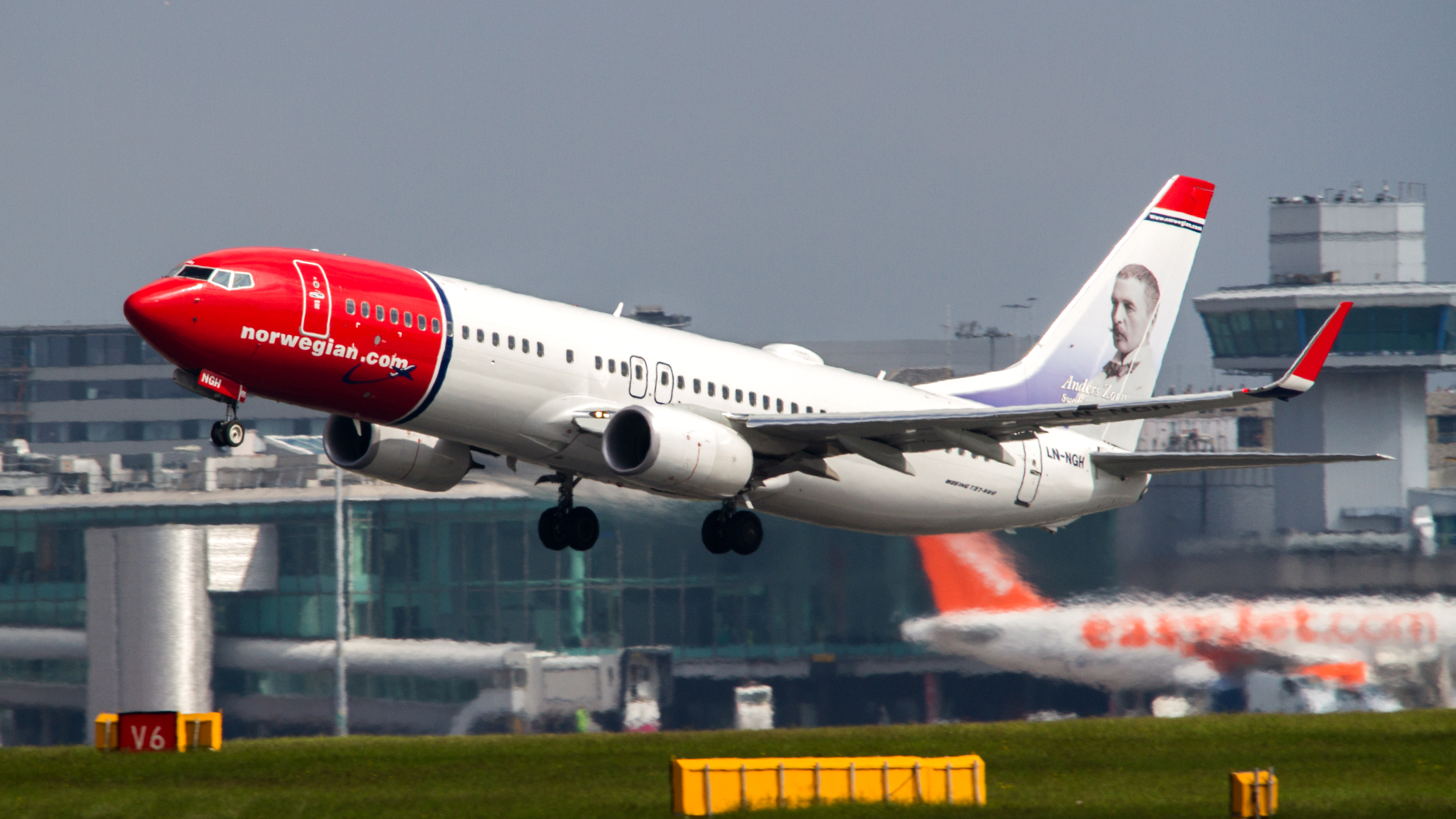 Manchester 31.05.13.